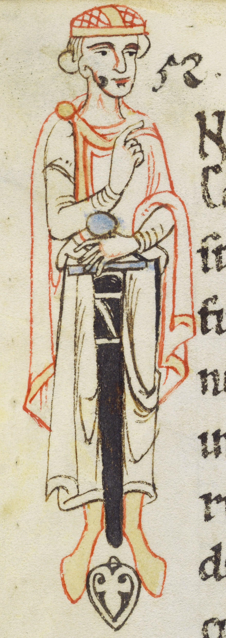 Acta Sancti Petri in Augia; St. Gallen, Kantonsbibliothek, Vadianische Sammlung, VadSlg Ms. 321, S. 52, Herzog Konrad II. von Schwaben